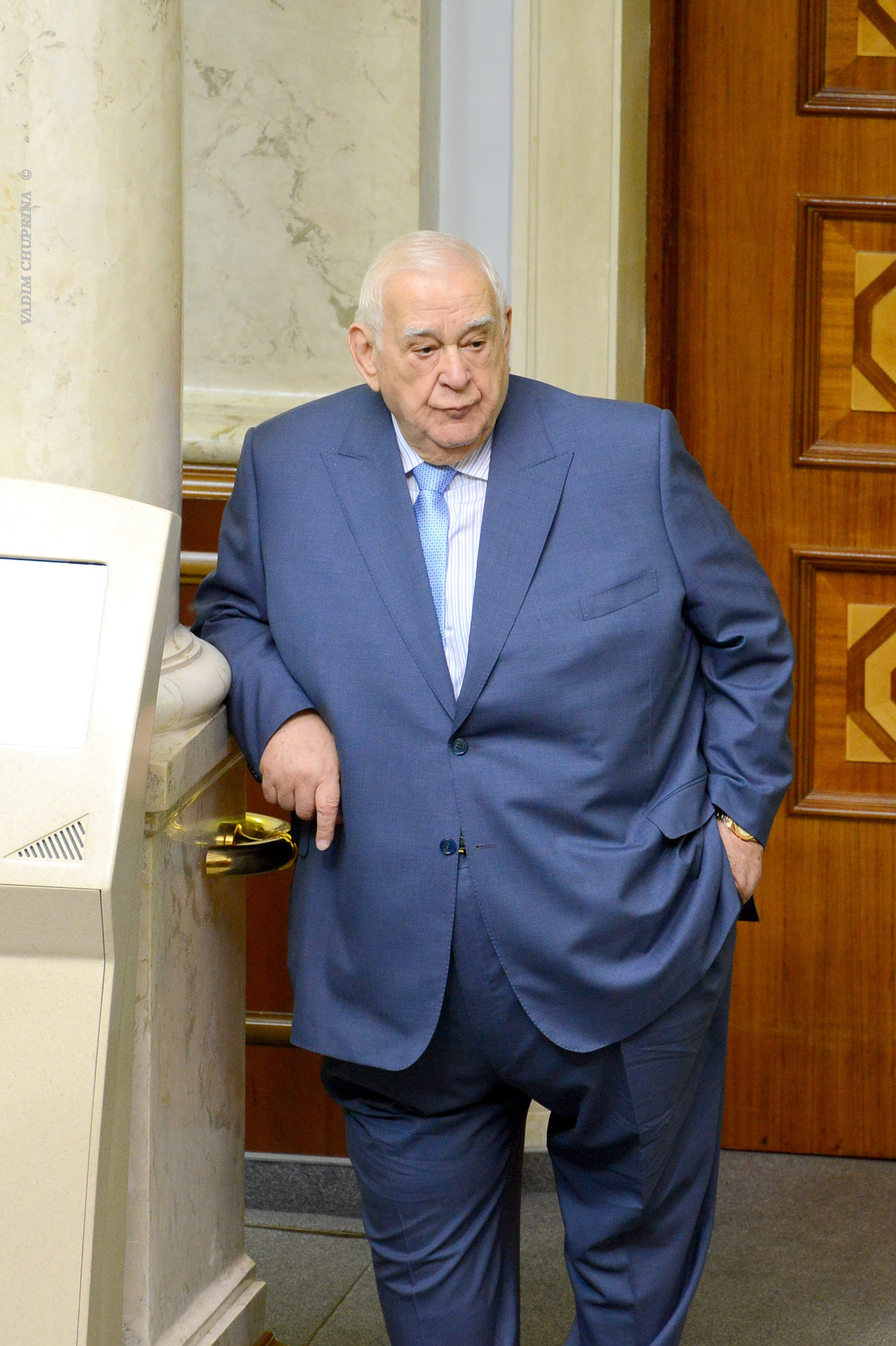 ВЕРХОВНА РАДА УКРАЇНИ 2013 , фото Вадим Чуприна